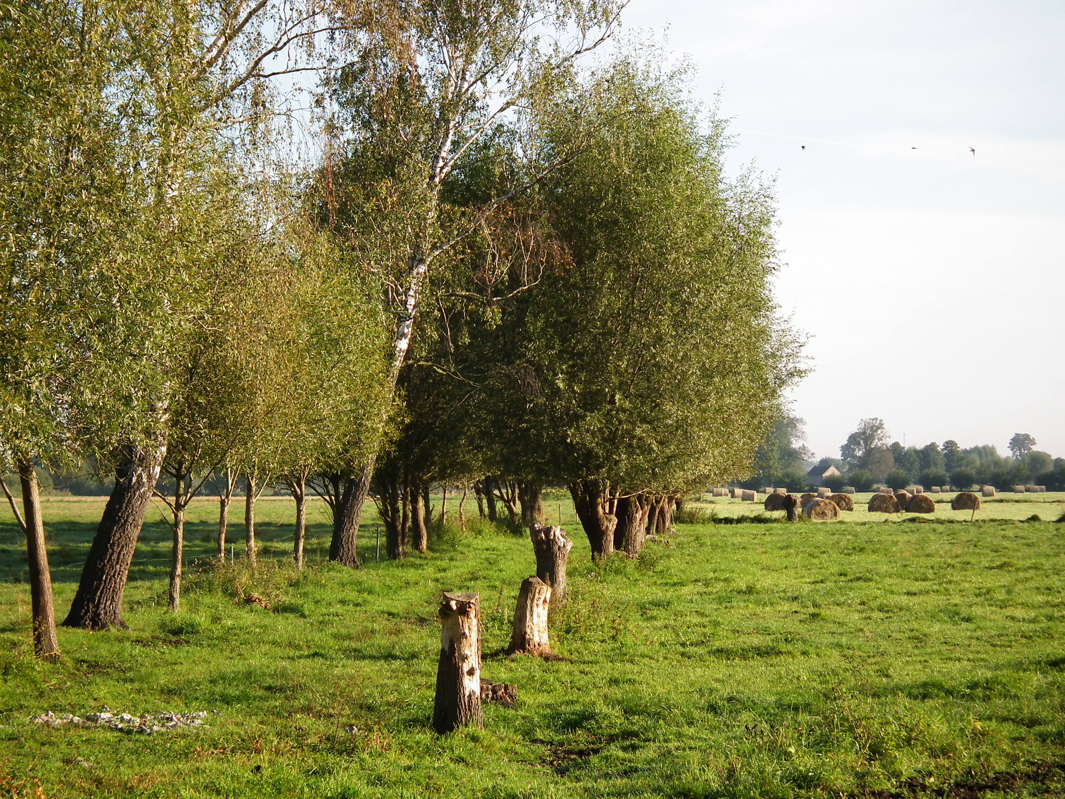 Krajobraz po kolonizacji fryderycjańskiej w Boleminie.